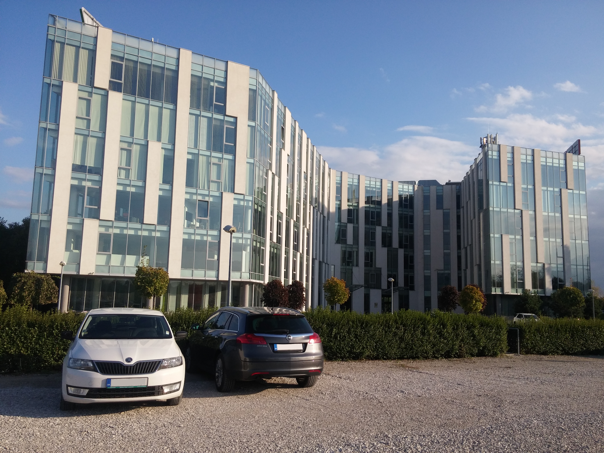 Aircraft building, Ivanská cesta, Bratislava